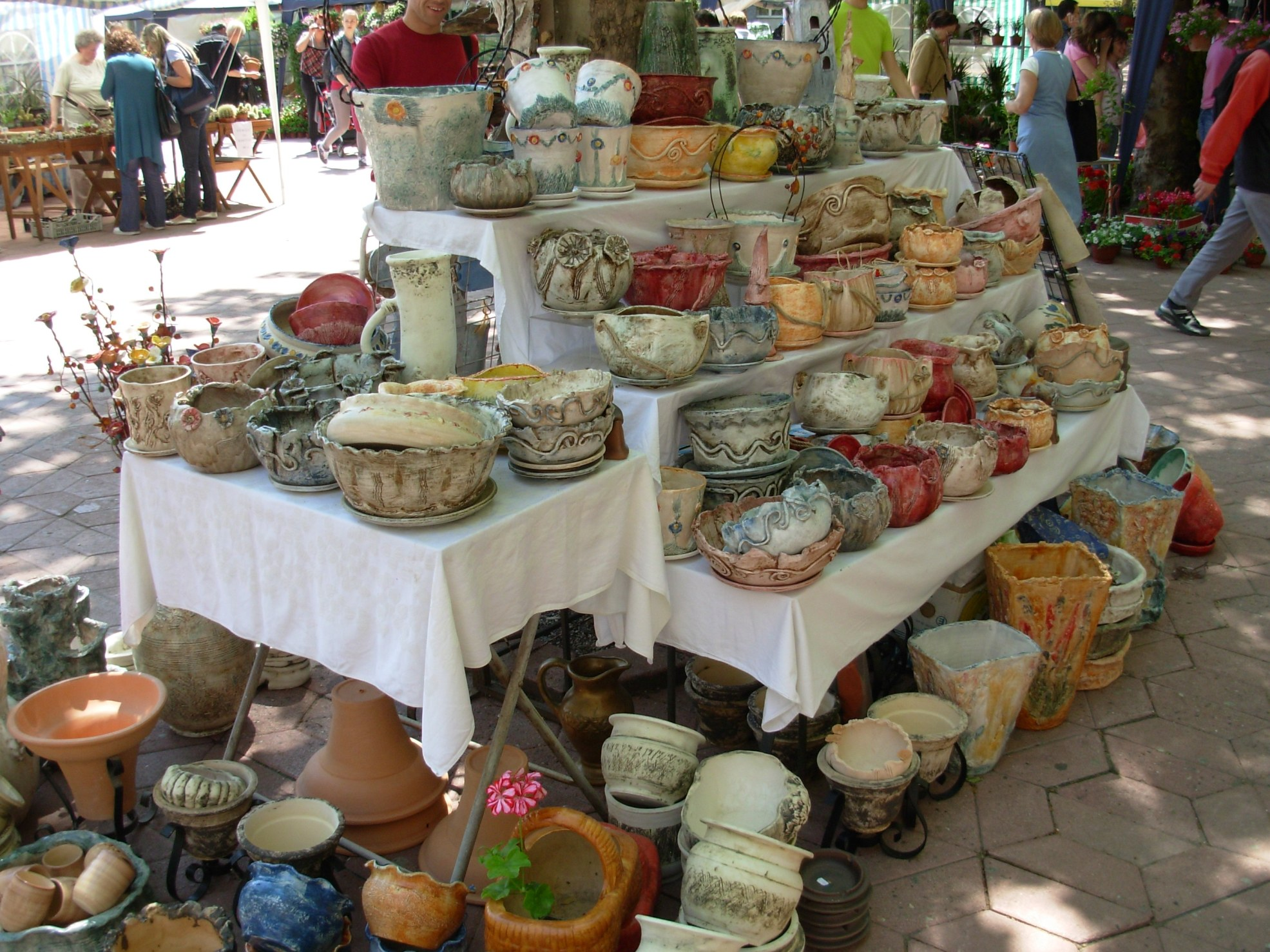 Керамика на сајму цвећа на Тргу Николе Пашића у Београду. Сликао Голдфингер.